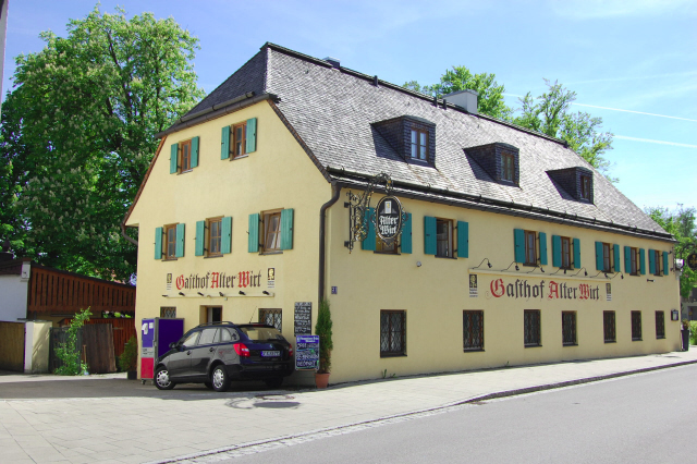 Krailling: Alter Wirt, 12 km from Starnberg, Deutschland (Zone 32).